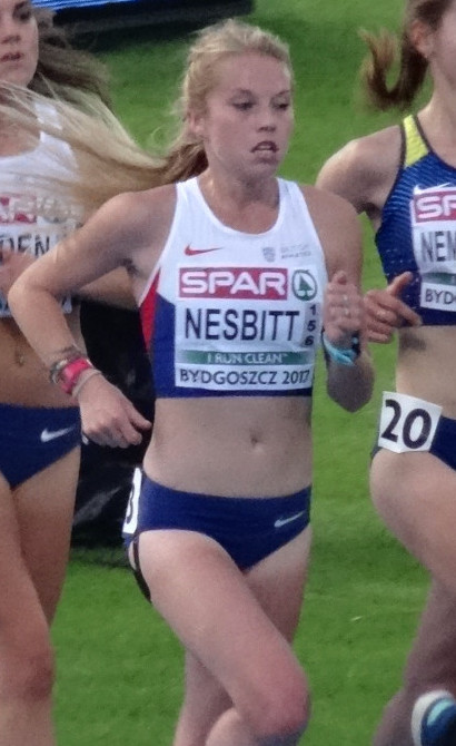 Młodzieżowe Mistrzostwa Europy w Lekkoatletyce U23 w Bydgoszczy 13-16 lipca 2017, finał biegu na 10000 m kobiet